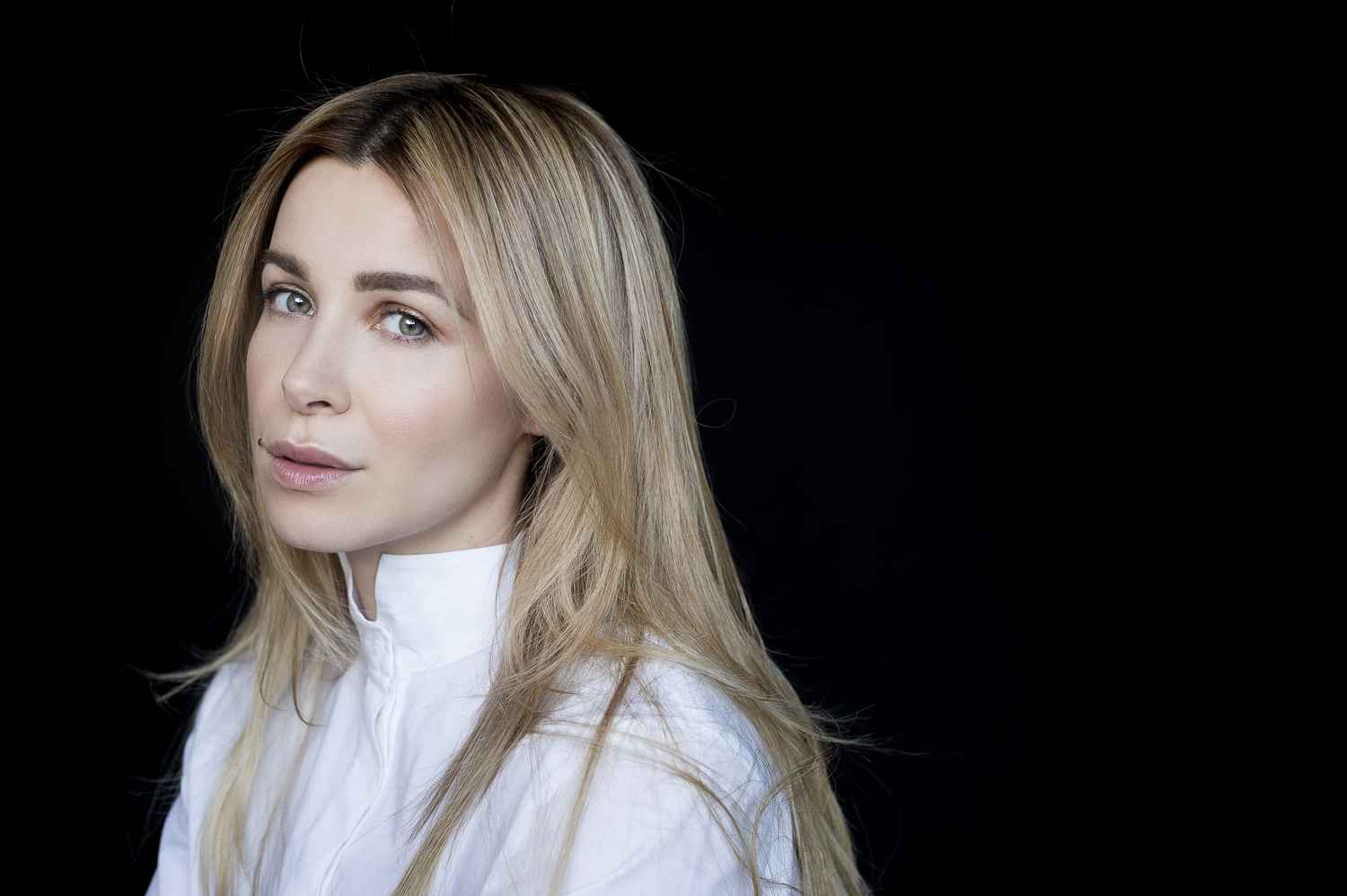 Victoria Koblenko art series "Back2Black" by Marcel Krijger